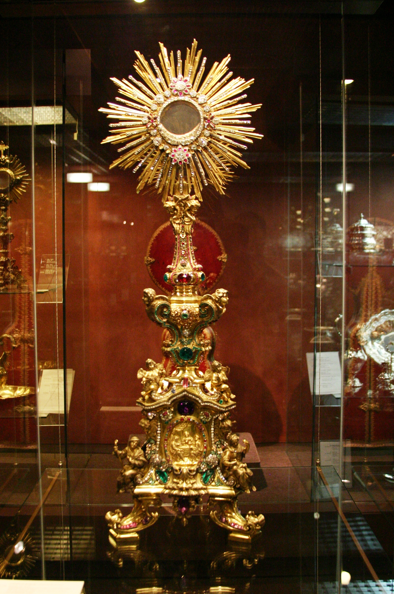 Custódia